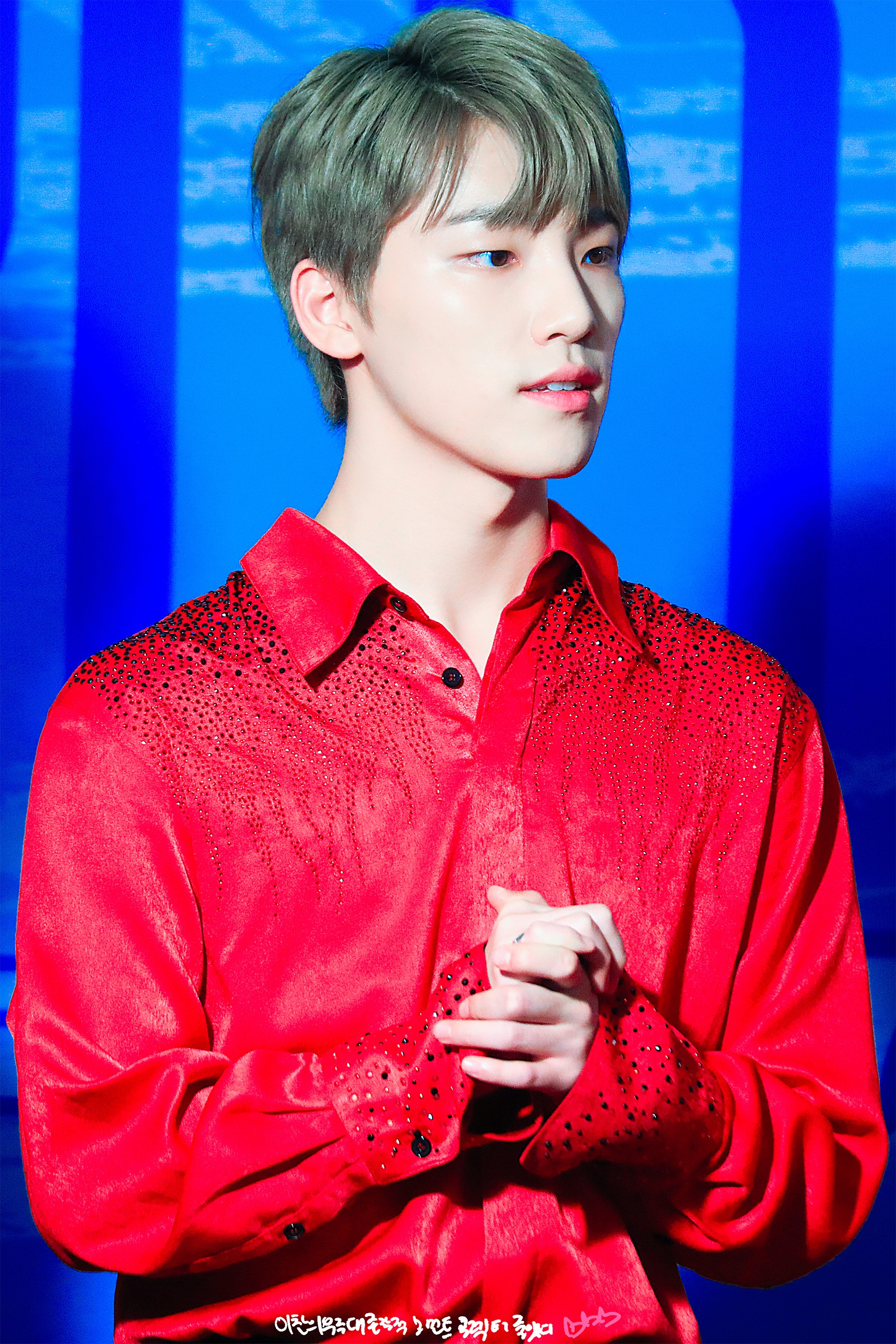 조선말: 170811 홍콩 APM 기자회견